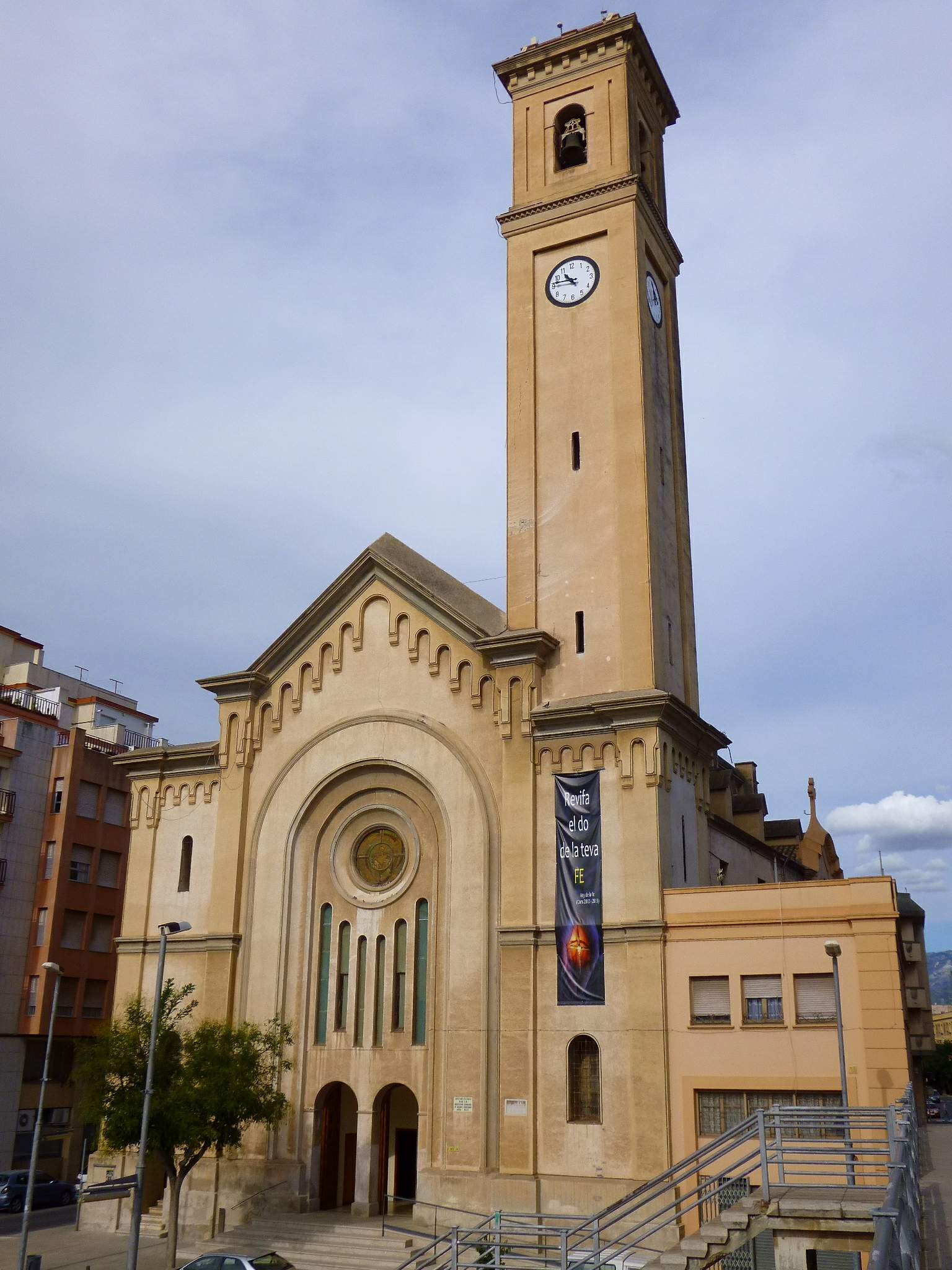 Iglesia del Roser (Tortosa, Tarragona)